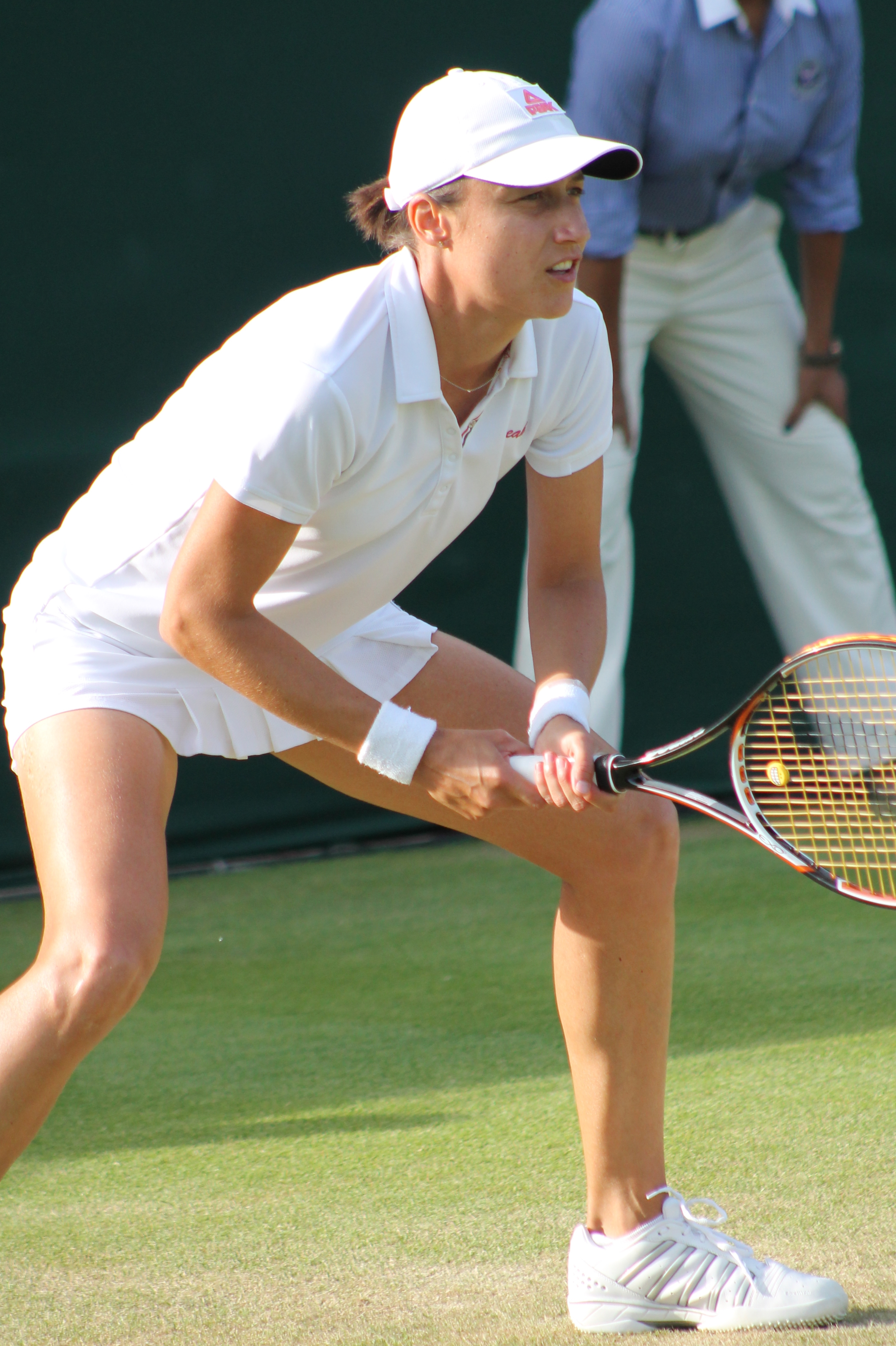 Srebotnik WM13-002